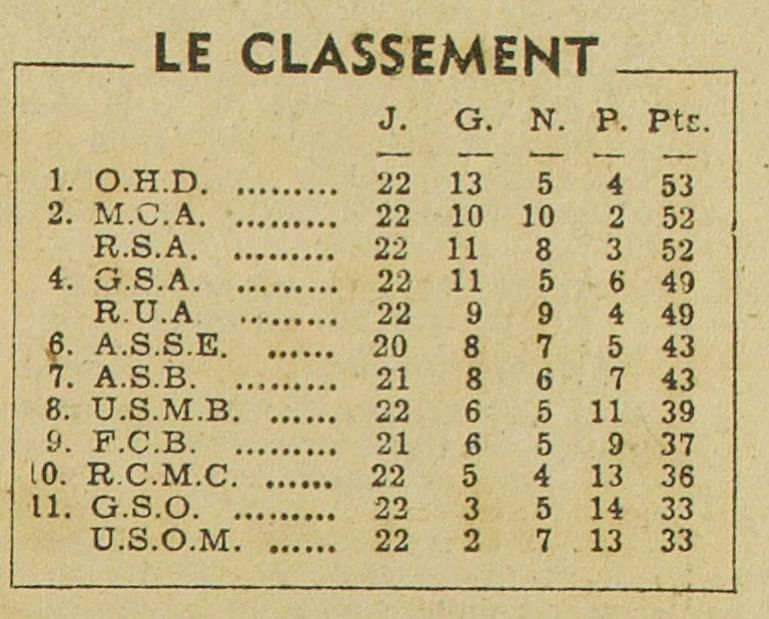 Classement Ligue d'Alger 1947-1948